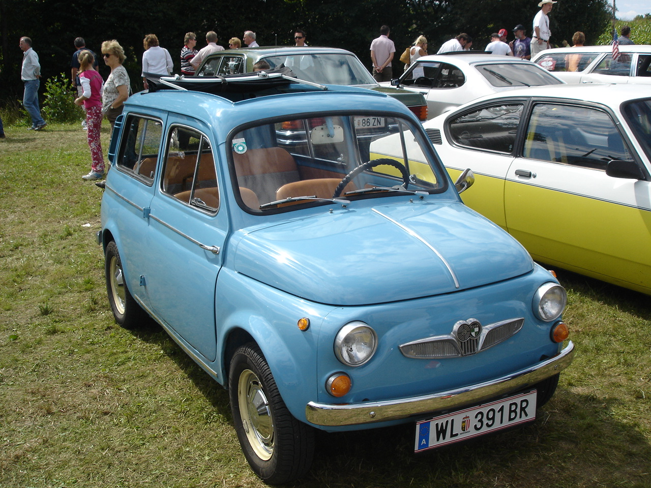 Puch 700 in blau